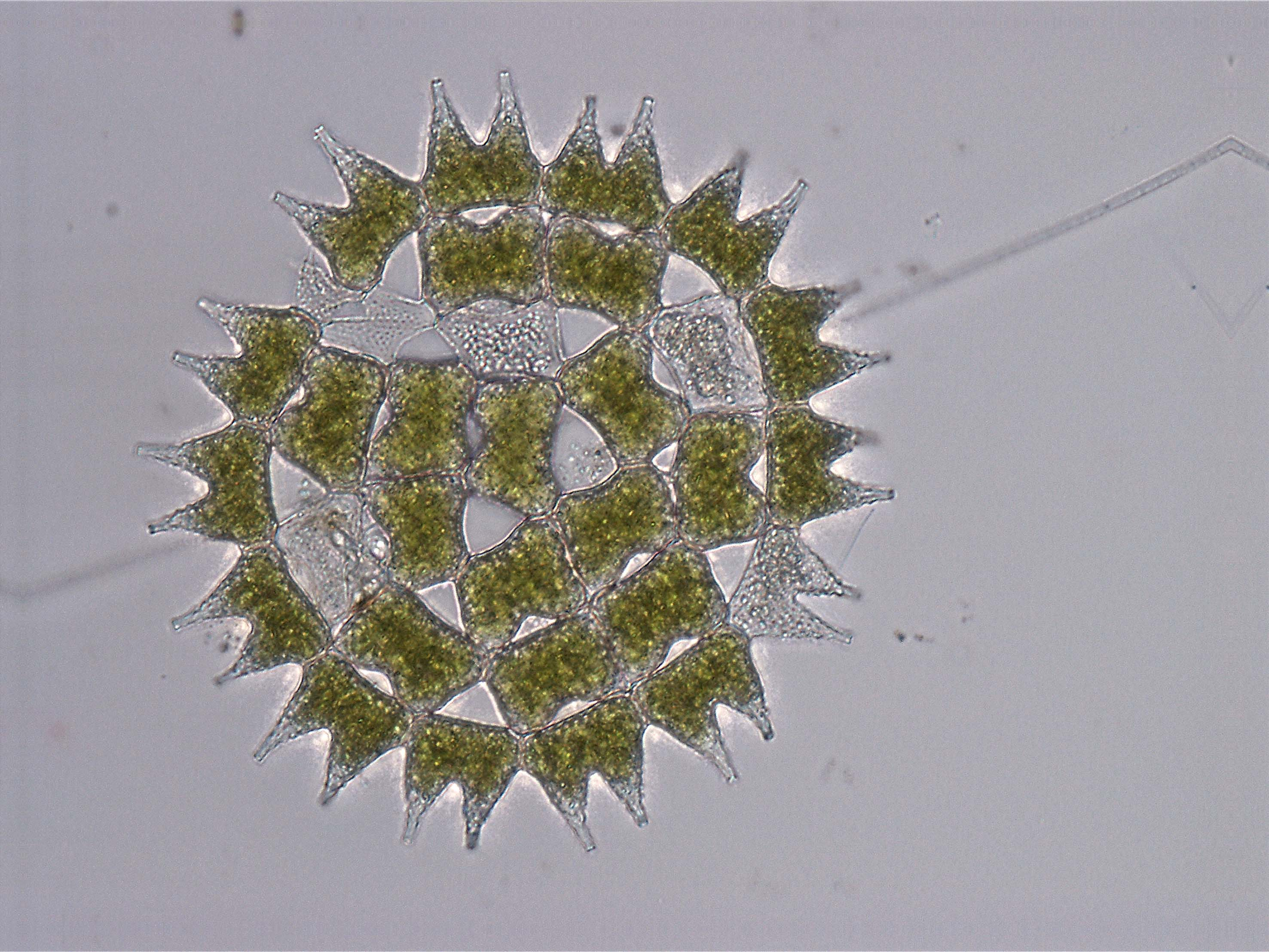 Mikrovetikas. Liikumatu lame koloonia, koosneb 8 kuni 32 rakust. Üks väheseid algrohevetikate liike, kus koloonias on rakud eristunud, servmised on pikkade jätketega. Pildi parameetrid: 400 kordne suurendus